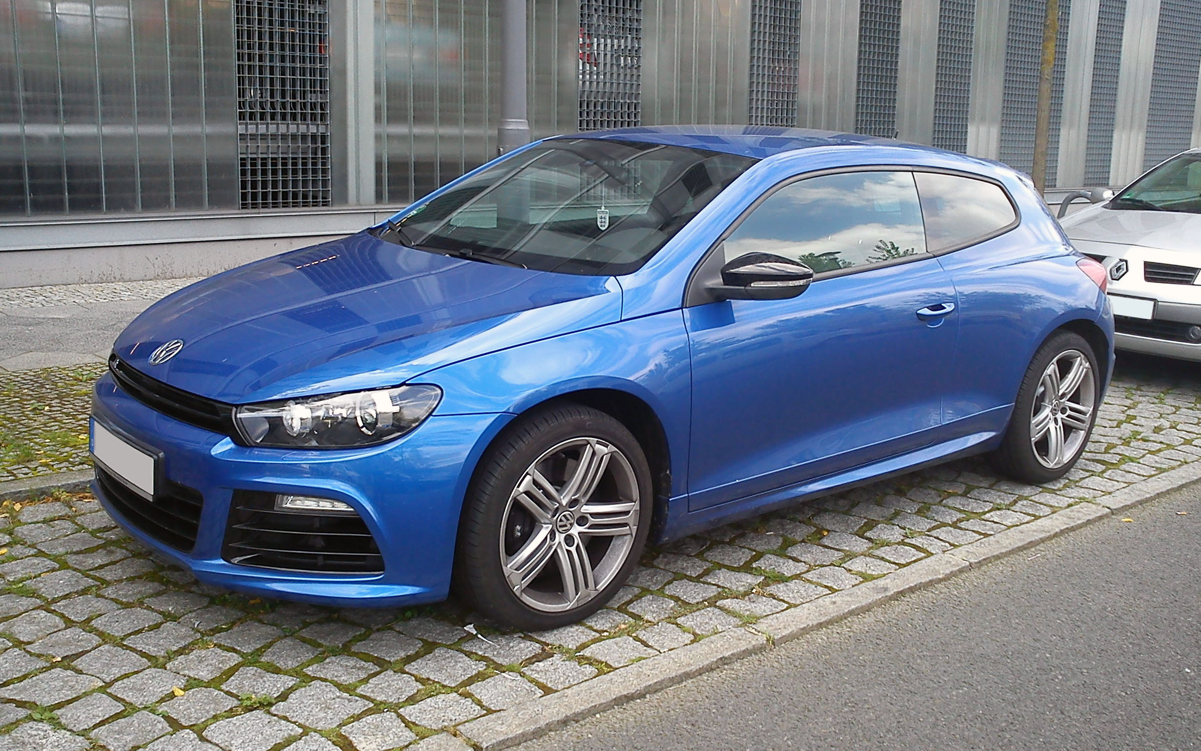 VW Scirocco R